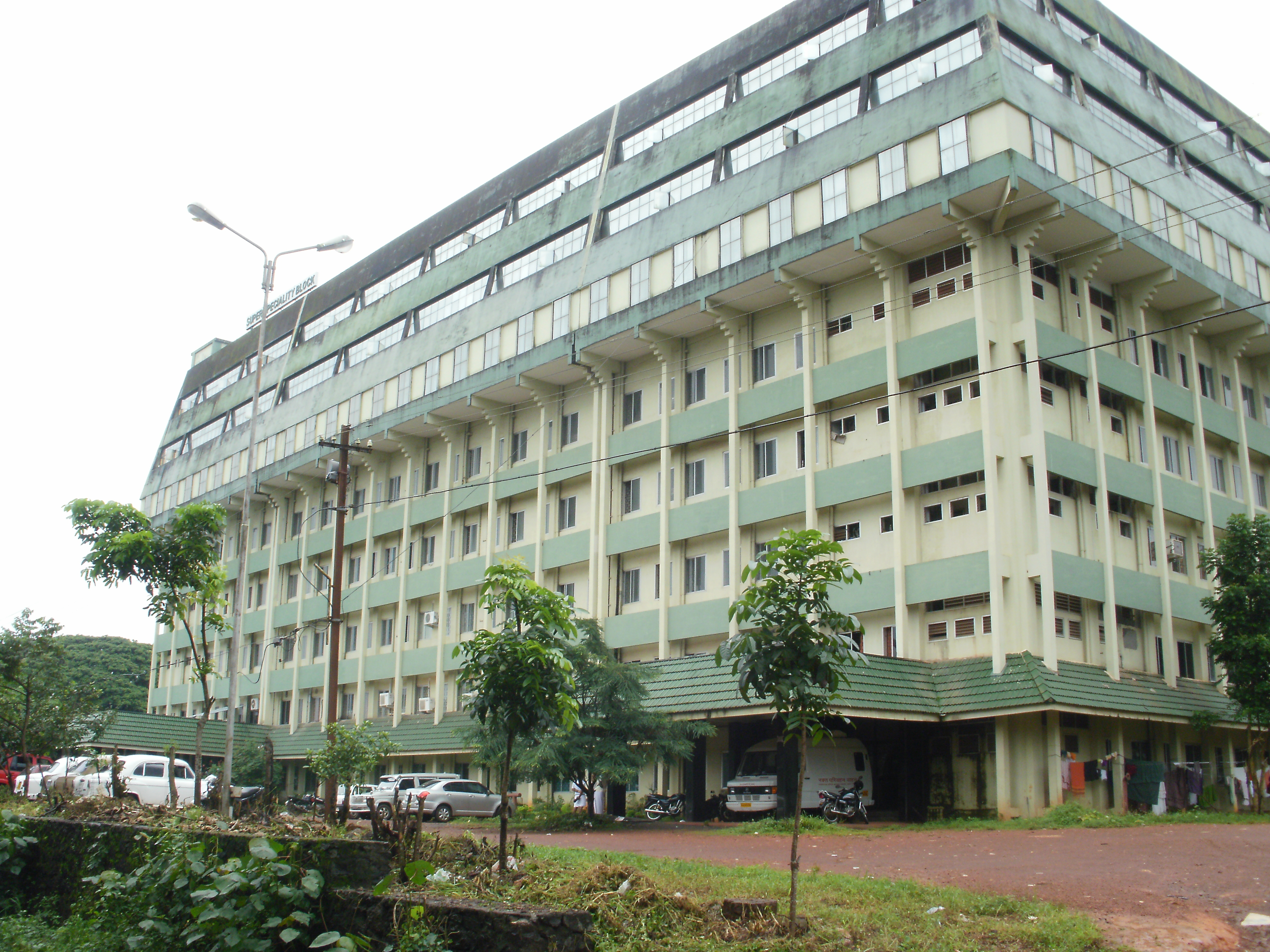 കോഴിക്കോട് മെഡിക്കല്‍ കോളേജ് ആശുപത്രി